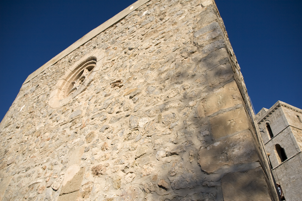 Museu Arqueològic (Eivissa).